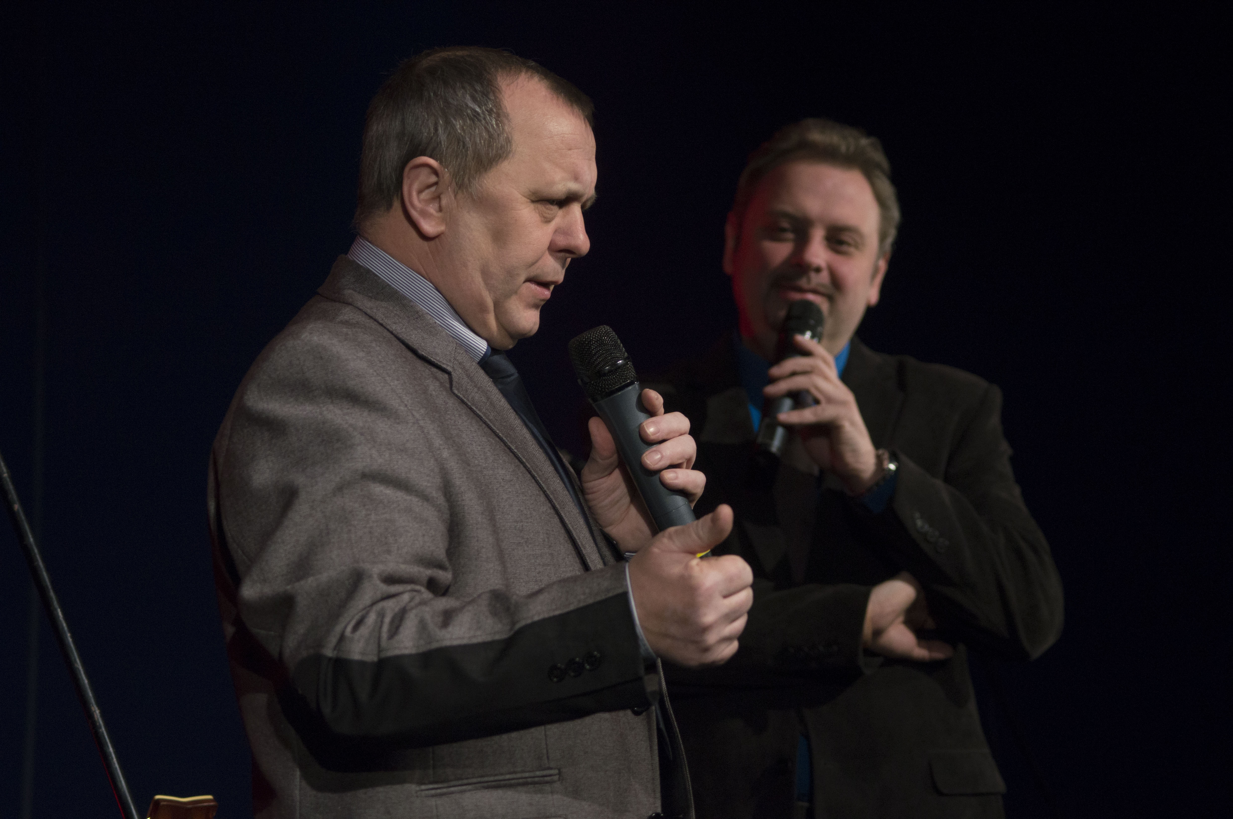 Prezenterzy Radia Fest Grzegorz Stasiak i Marcin Janota.